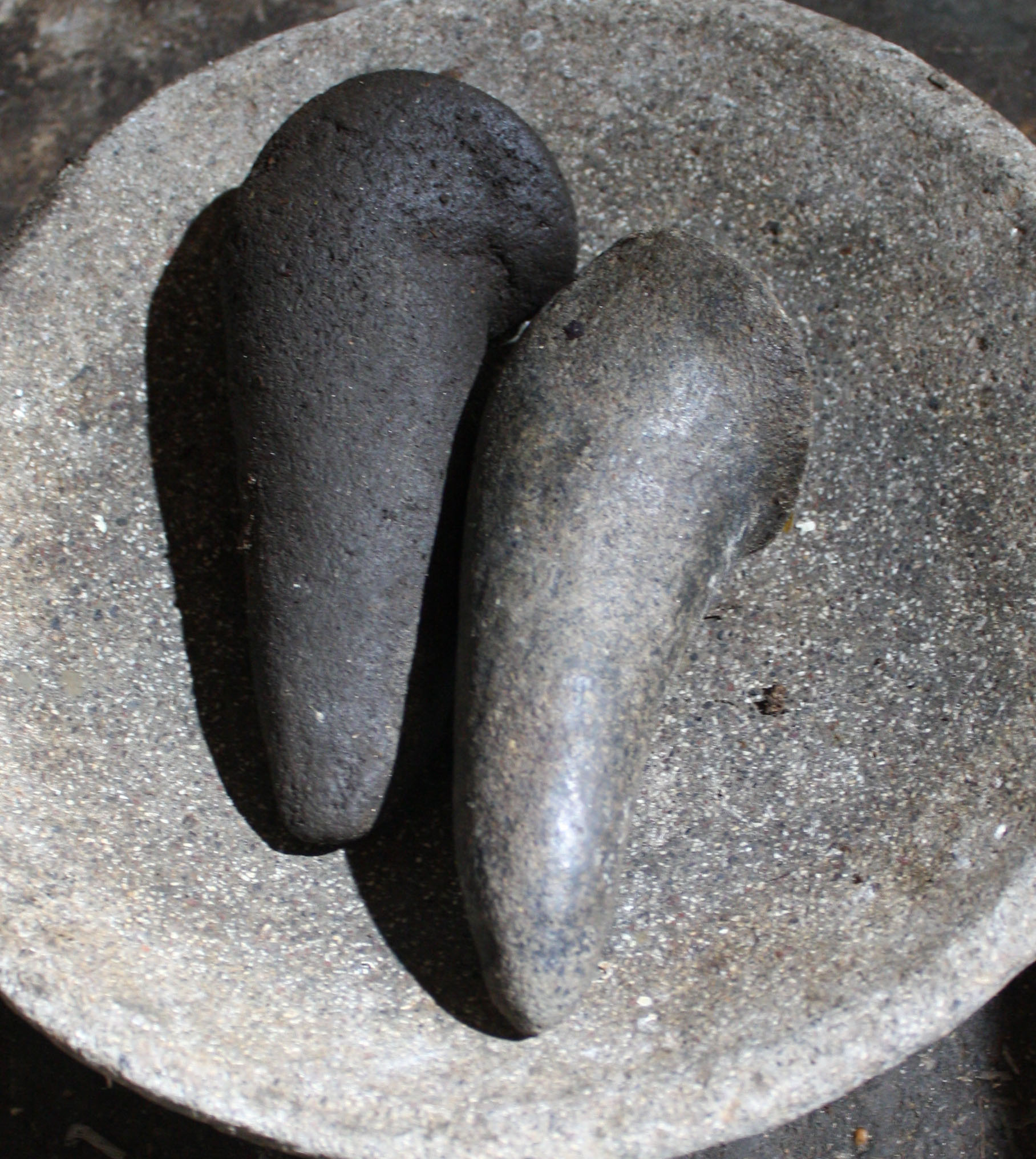 Uleg-uleg adalah salah satu alat yang ada di dapur yang dimanfaatkan untuk menghaluskan bumbu masak atau yang lain diatas cobek